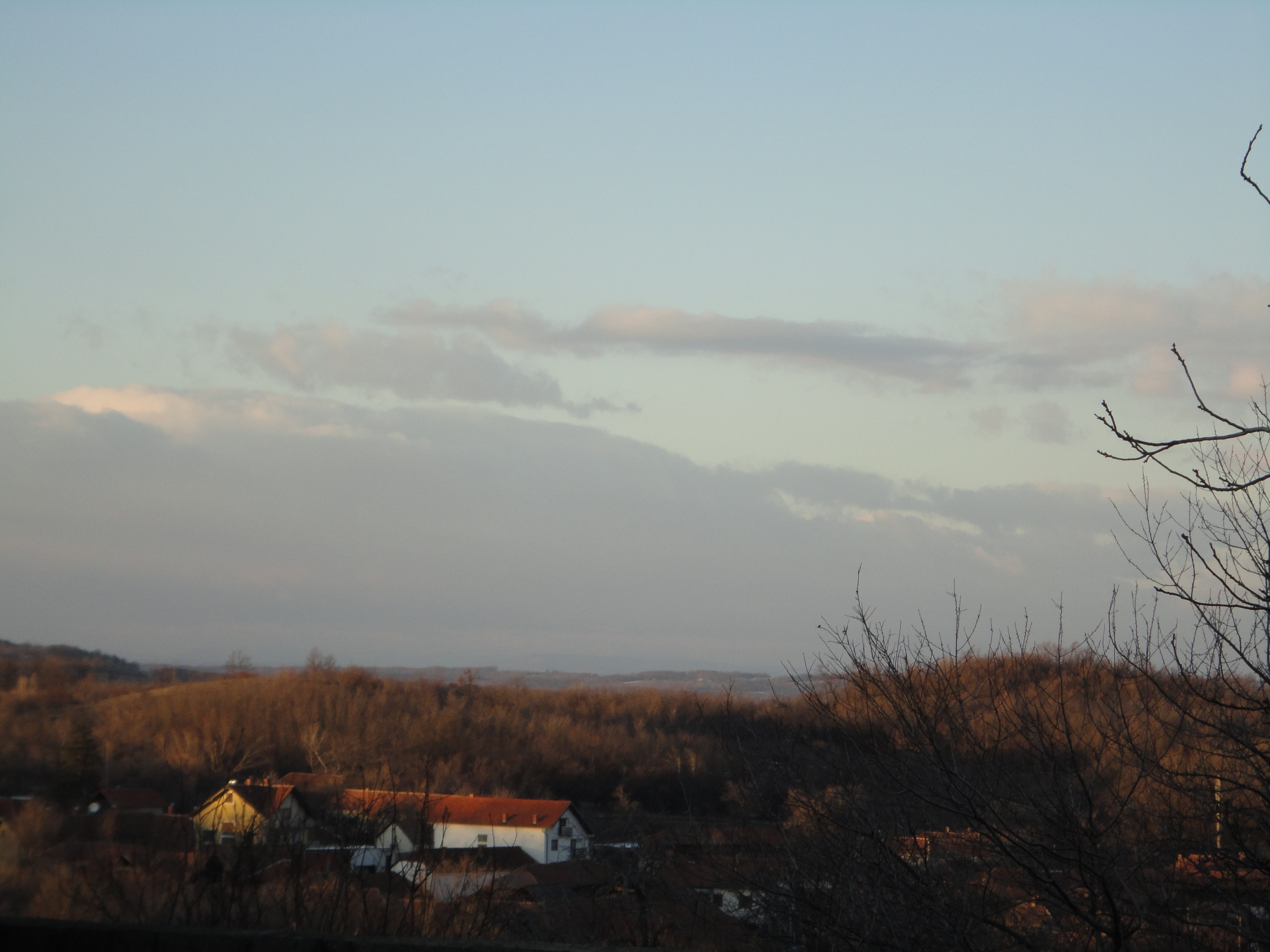 PanoramaBrestovcakodNegotina